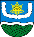 Herb Rudnika w powiecie cieszyńskim, gminie Hażlach